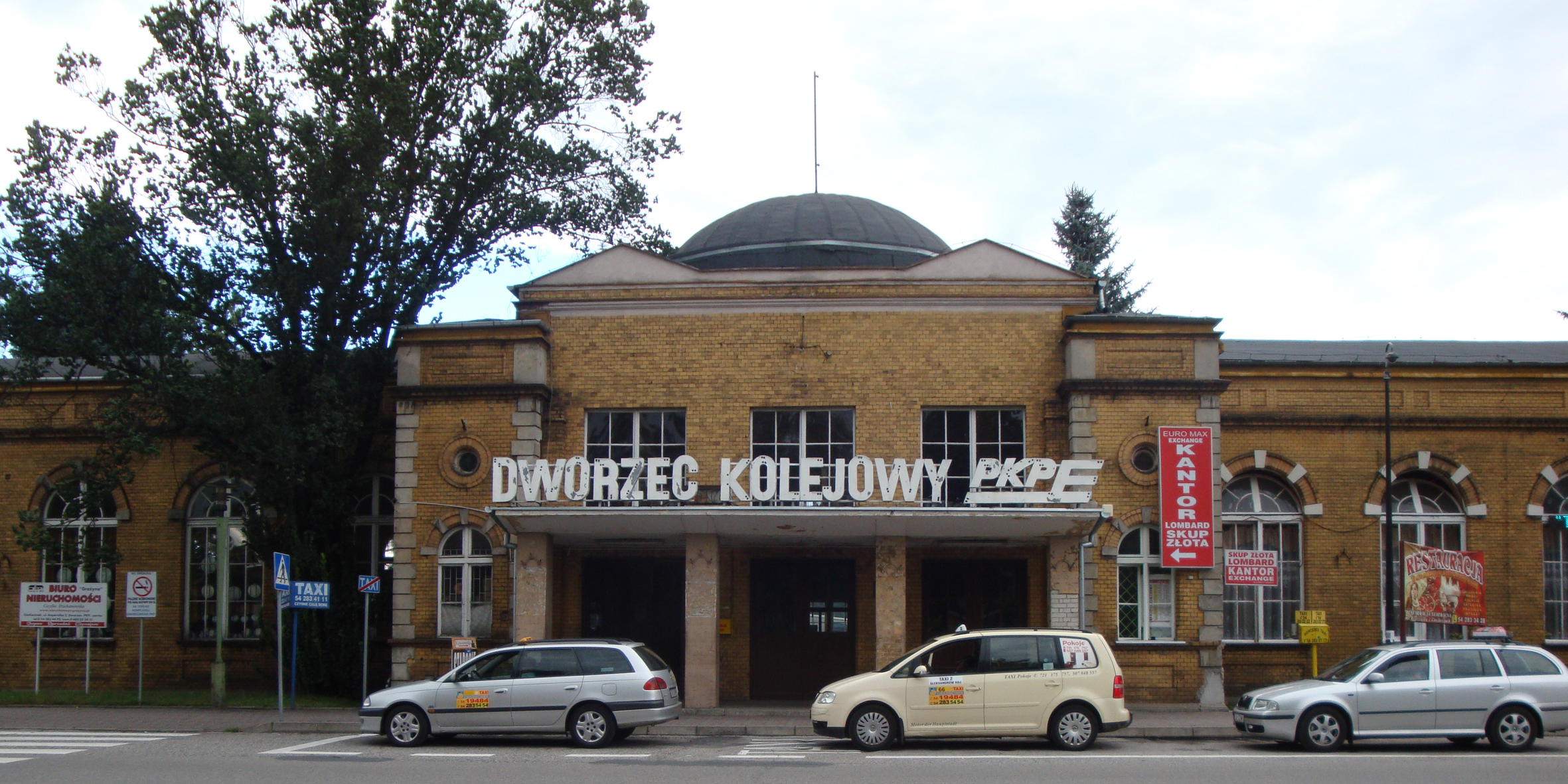 Ciechocinek, dworzec kolejowy Nowy, 1901-1902